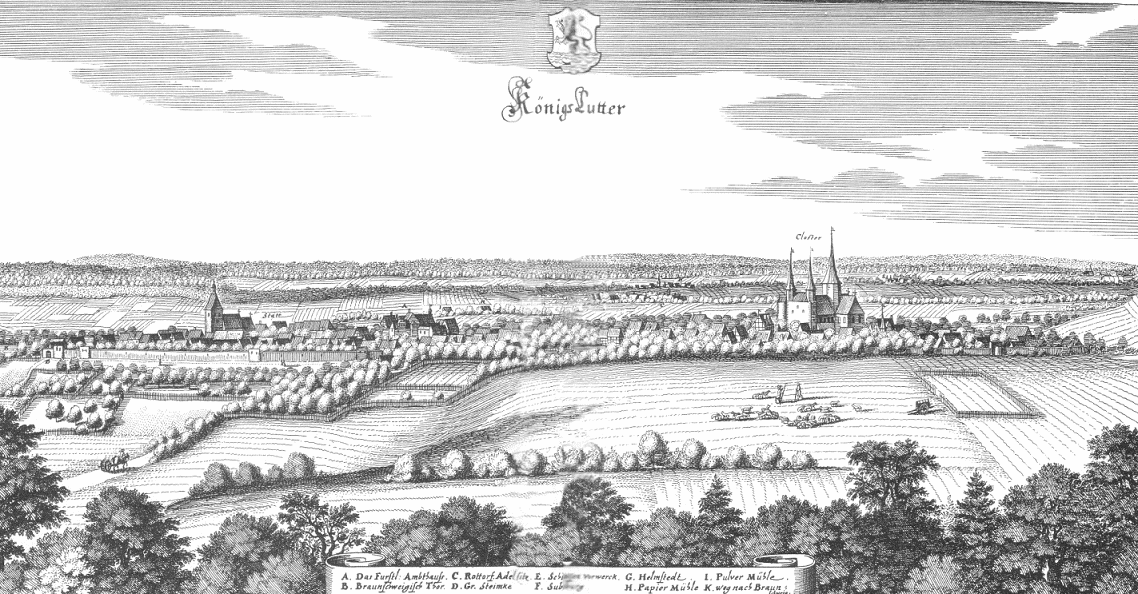 Alte Ansicht der Stadt Königslutter von Merian